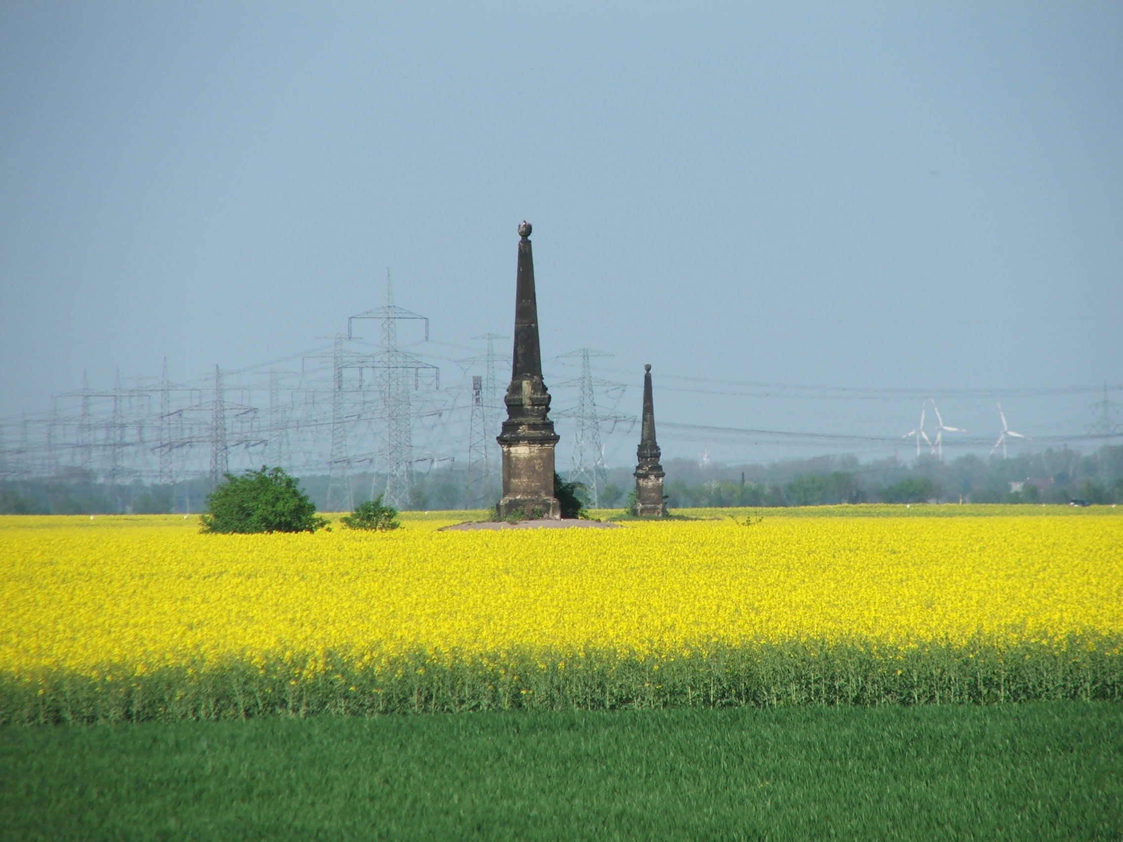 Platz des Lustlagers mit zwei der drei barocken Obelisken